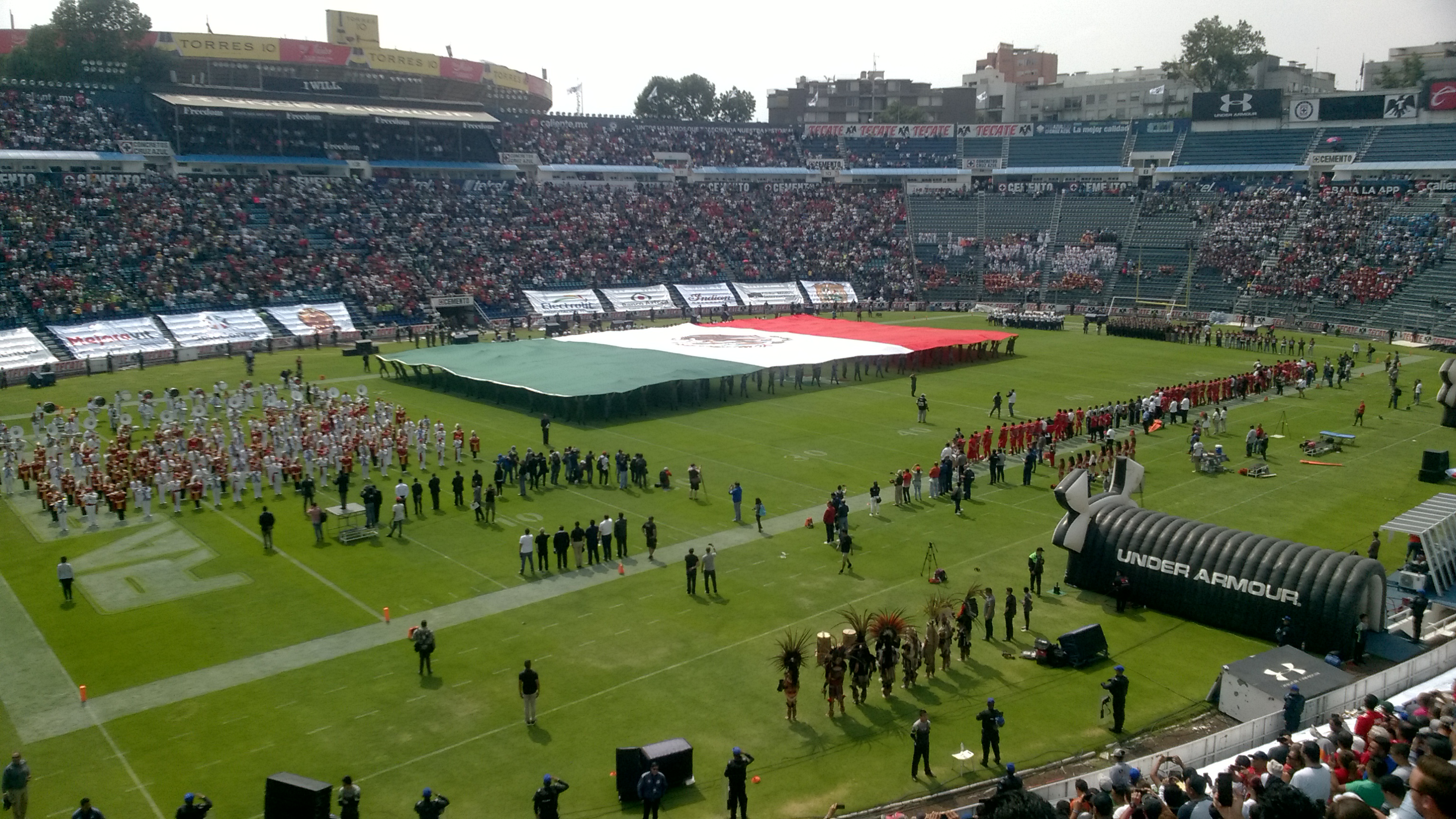 Tazón México III